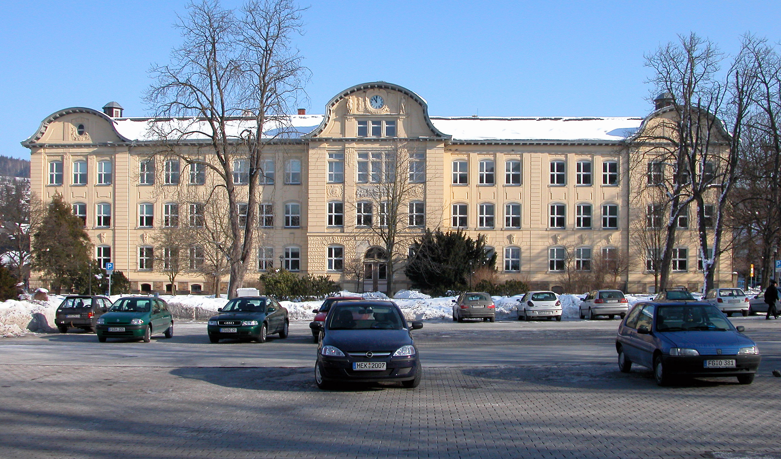 08.02.2005 09526 Olbernhau: Schulgebäude (GMP: 50.658244,13.33946). Entwurf des Olbernhauer Baumeisters Carl Winkler. Zwei Bauabschnitte. Einweihung des ersten Abschnitts am 1. April 1900. Der von Anfang an geplante Zweite Abschnitt wurde von 1908 bis 1909 gebaut. In der DDR genutzt als 10-klassige Polytechnische Oberschule, Karl-Marx-Straße 23, danach Mittelschule Albertstr. 23. [DSCN5898]20050208100DR.JPG(c)Blobelt